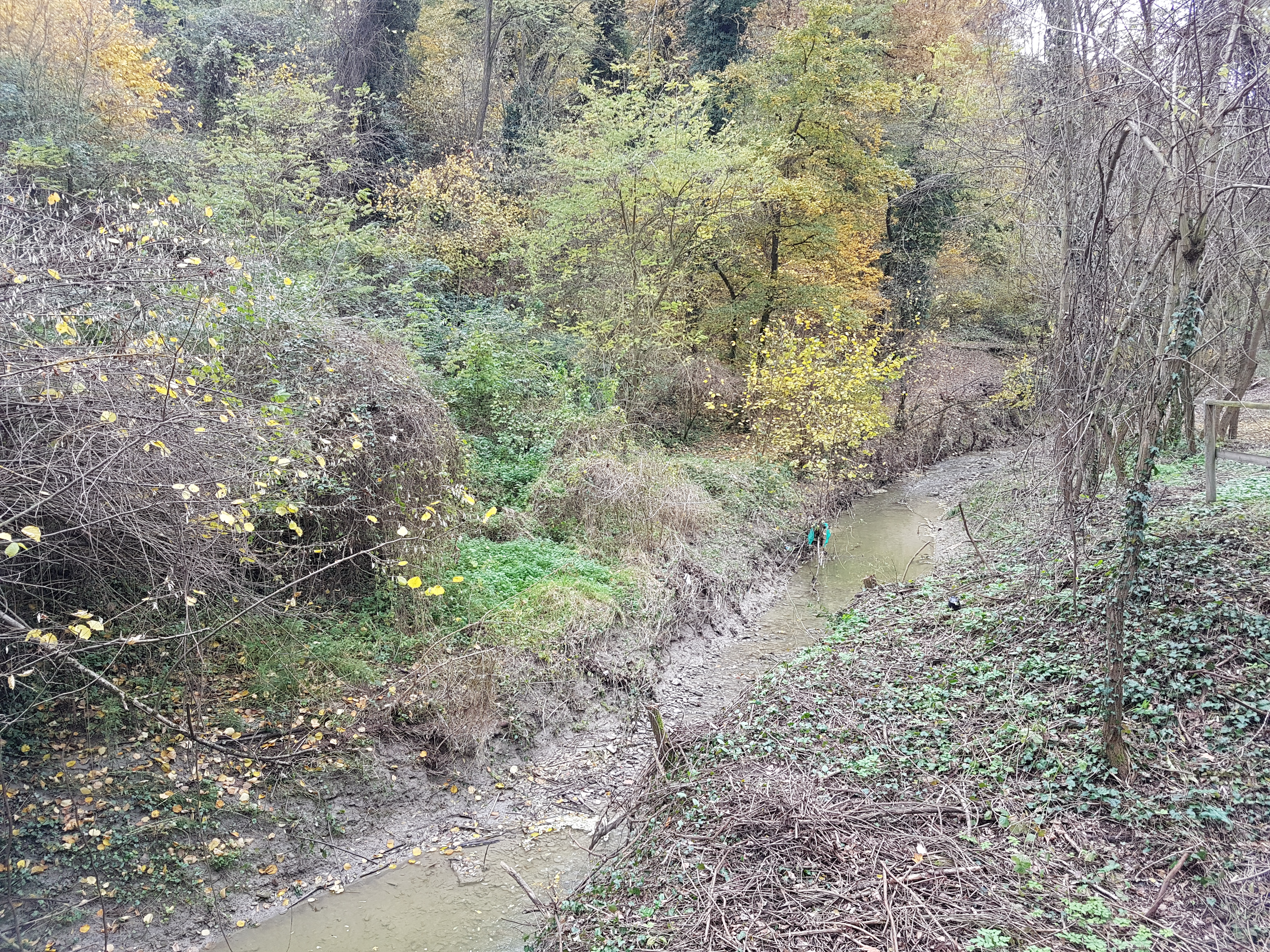 Il torrente Landa nei pressi di Ponterivabella, frazione del comune di Monte San Pietro